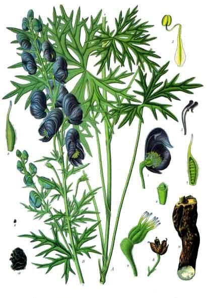 Himalaya-Eisenhut. A, B oberer Teil der Pflanze. 1 Blüte im Längsschnitt; 2 hintere Blumenblätter; 3 Staubblatt; 4 Pistille; 5 Pistill, von der Seite; 6 Pistill, Querschnitt; 7 Pistill, Längsschnitt; 8 Früchte; 9 Samen; 10 derselbe vergrössert; 11 Wurzel von Aconitum heterophyllum